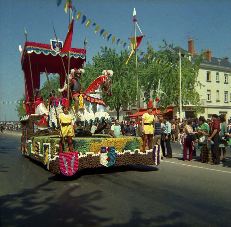 Défilé fleuri 1972 Quartier des Ponts Les Tournois du Roi René